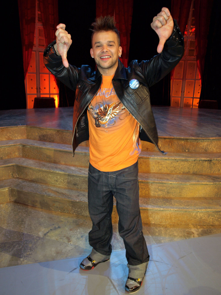 Michał Piróg podczas nagrania programu You Can Dance w budynku Opery Wrocławskiej